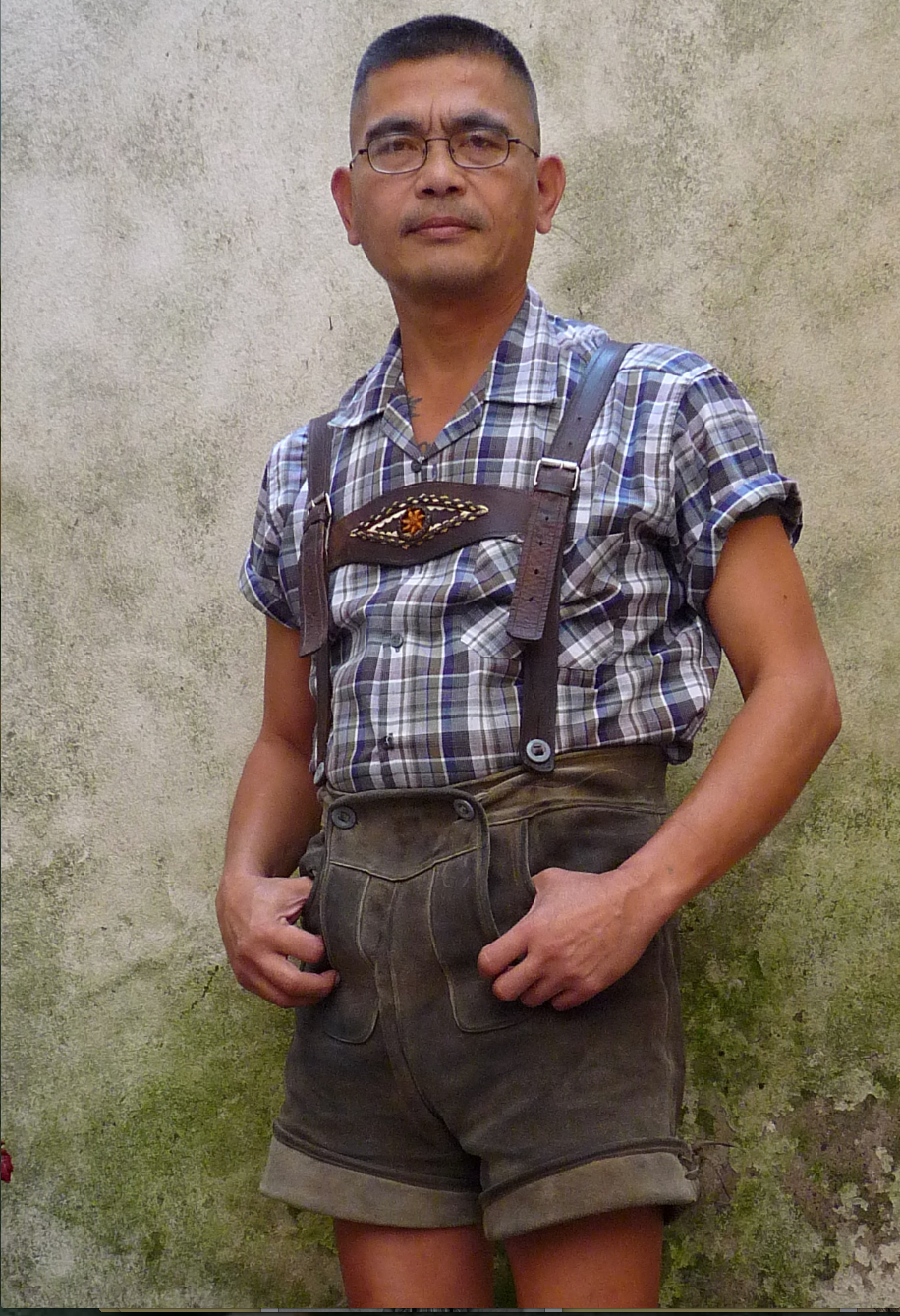 Knopflatz Lederhose